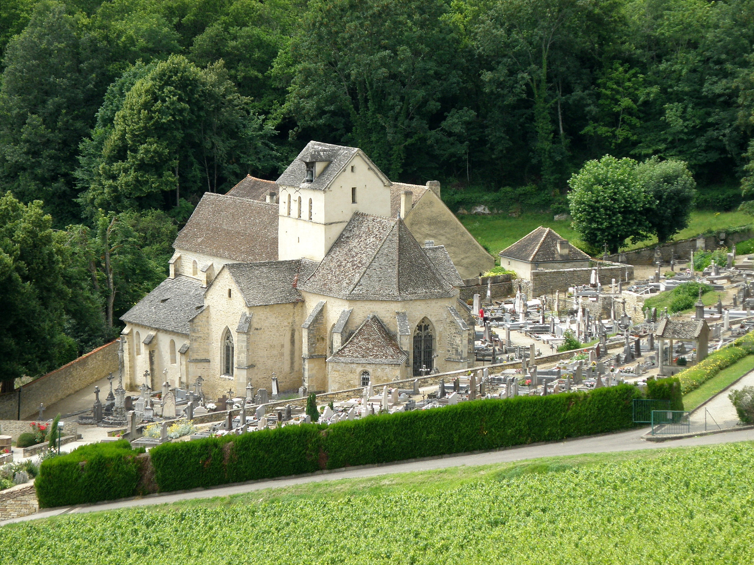 Santenay (Côte-d’Or, Bourgogne, France). Église Saint-Jean-de-Narosse, dans le hameau de Saint-Jean.